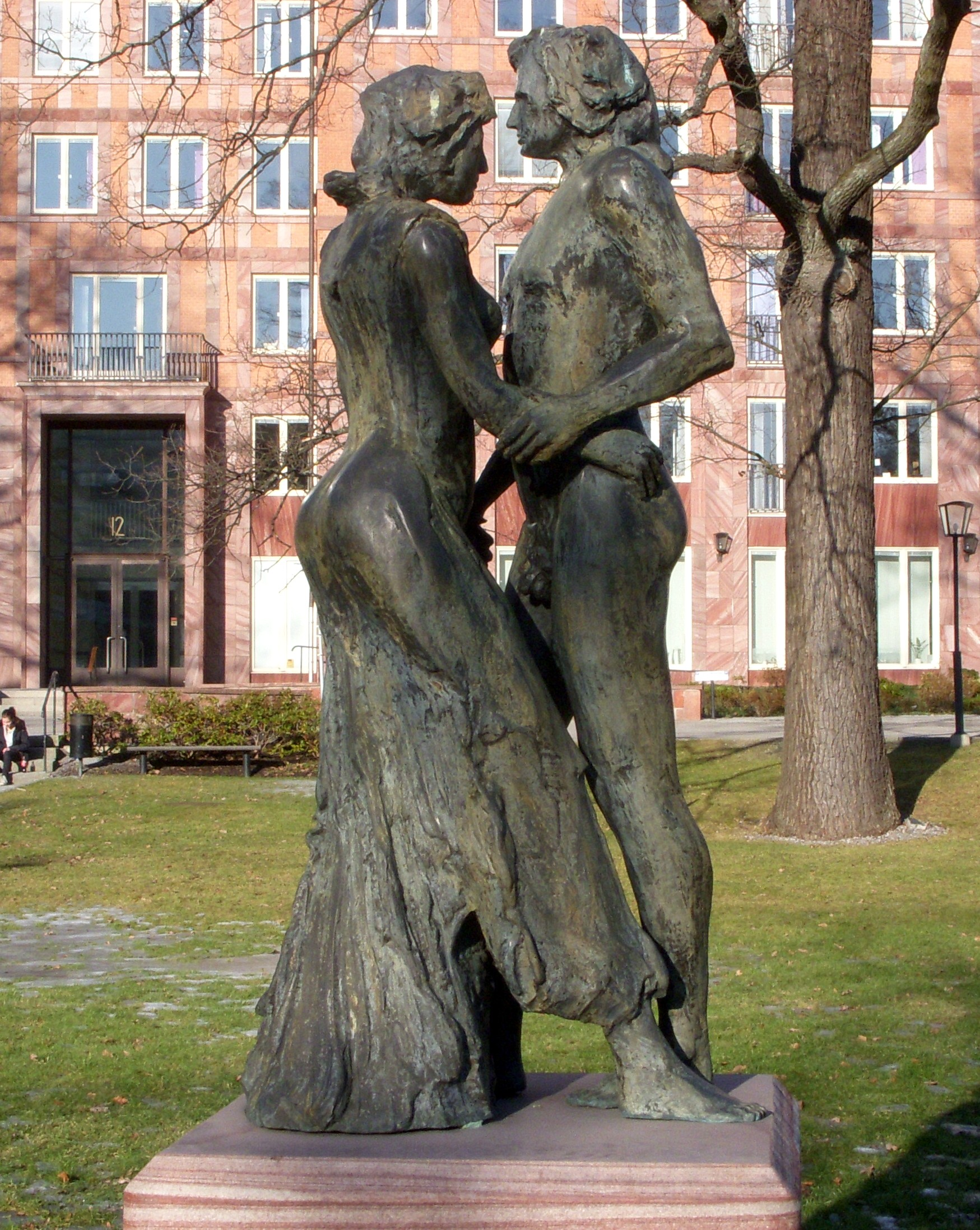 Bo Åke Adamssons skulptur "Omtanke" (1998) i Alvik